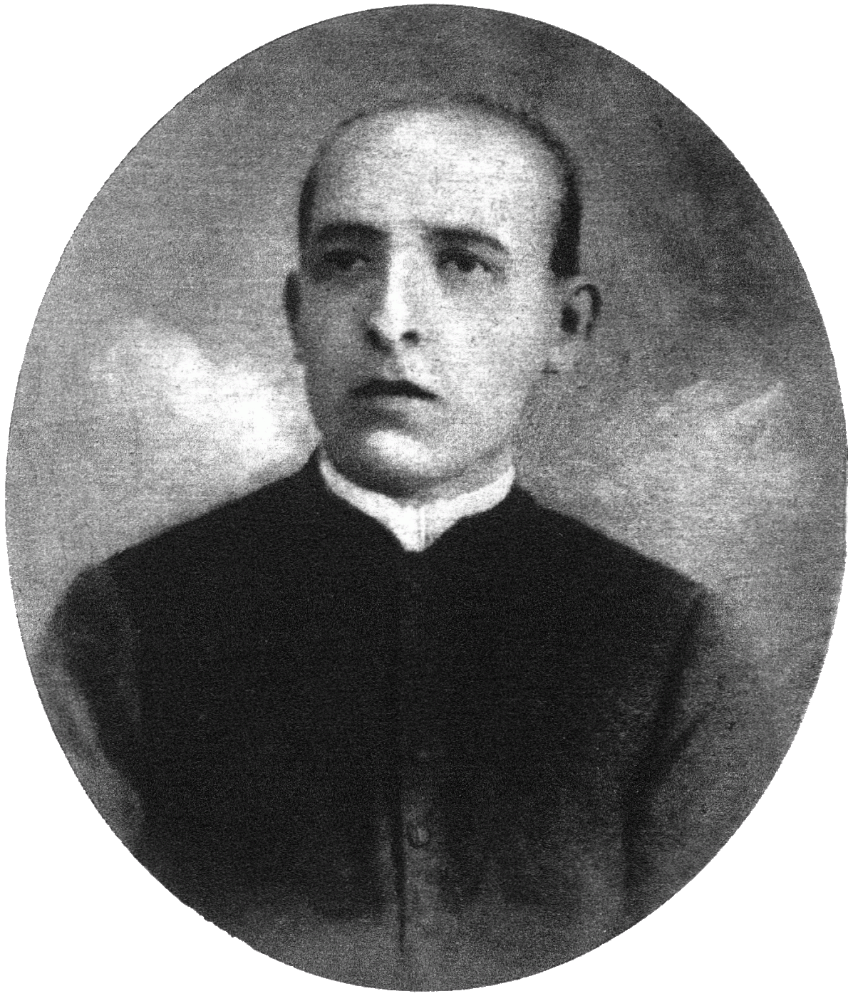 Ignaz Seipel (1876-1932), Austrian priest and politician